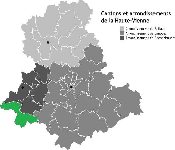 Canton de Saint-Mathieu, Limousin, France en Carte des arrondissements de la Haute-Vienne